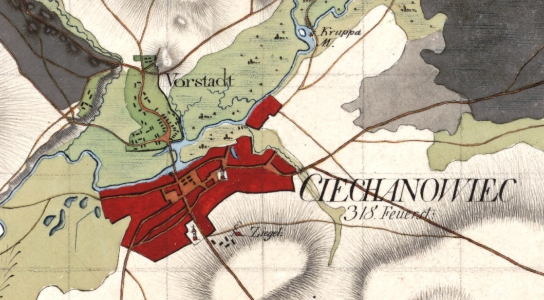 Oryginał znajduje się w Staatsbibliothek Berlin, sygn. 17030 sekt 111. Mapę wykonano w 135 arkuszach, w indeksie są 122 arkusze. Na terenie miejscowości było 318 budynków mieszkalnych.